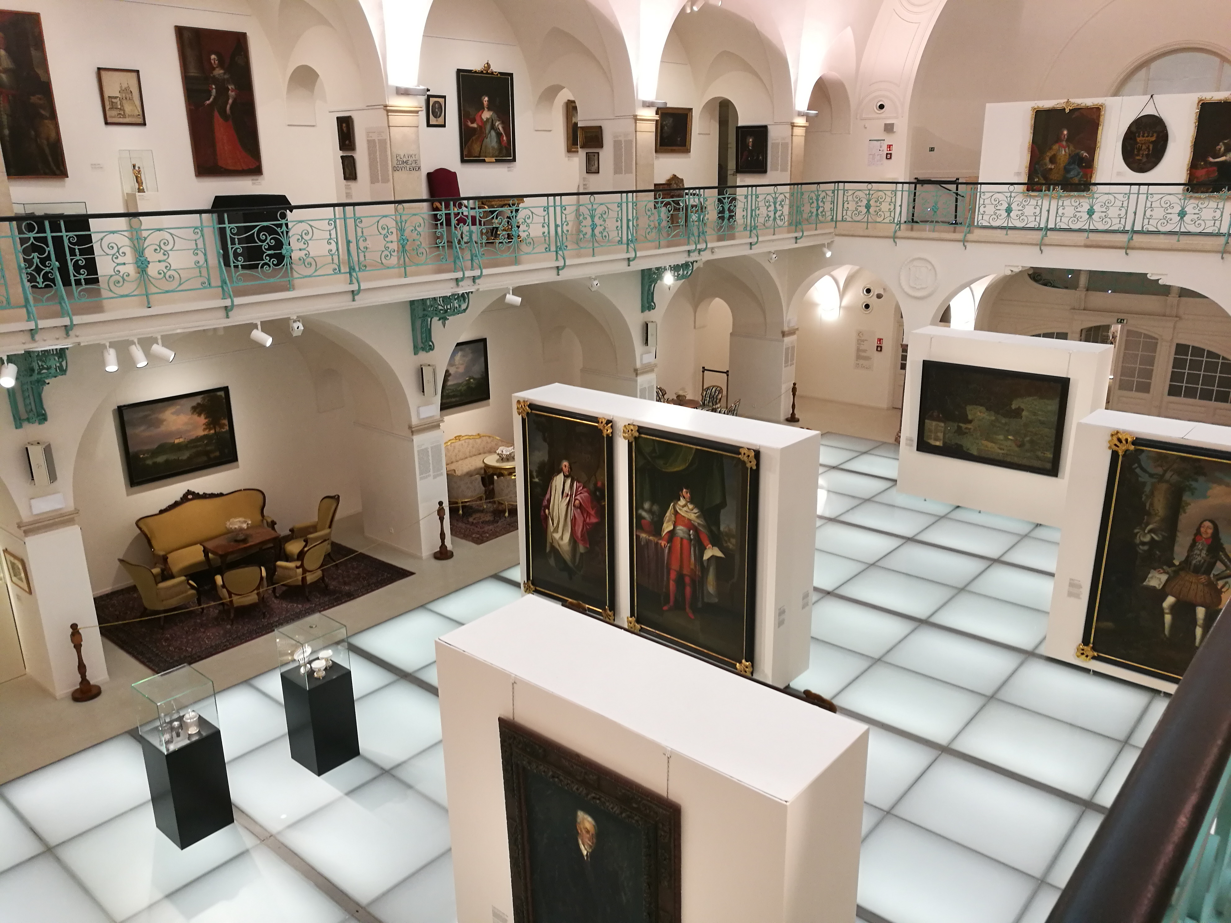 Instalace výstavy Spravedlnost bez bázně: Spravedlnost bez bázně: Gallasové a Clam-Gallasové v Čechách v Oblastní galerii Liberec, na ploše bývalého bazénu ochozu v budově bývalých městských lázní.